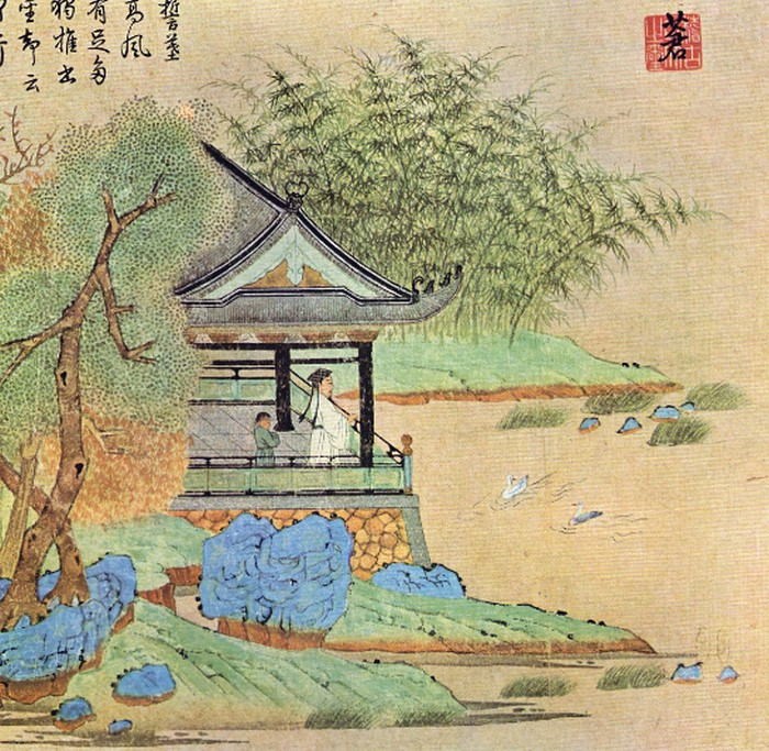 Wang Xizhi regardant des oies - Section d'un rouleau horizontal. Encre et couleurs sur papier - (H. 23,2cm) New York, collection C.C.Wang. Par le peintre chinois Qian Xuan (1235-1300 ou 1301).